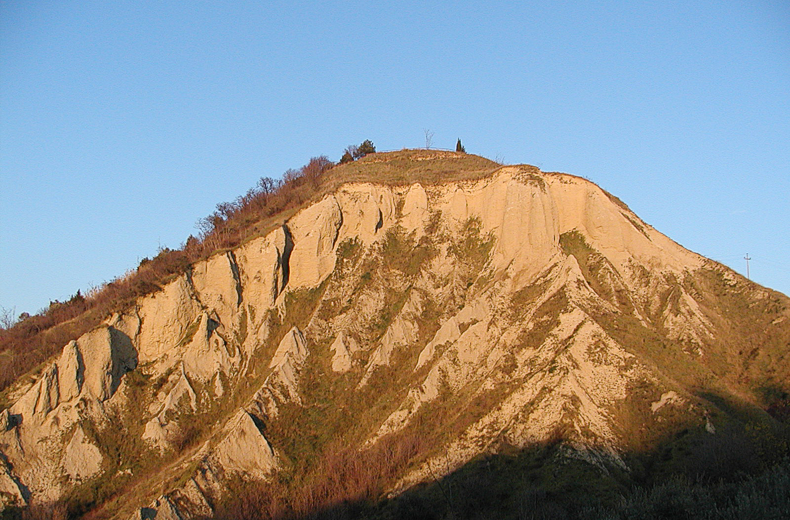 Erosion bei Pescara